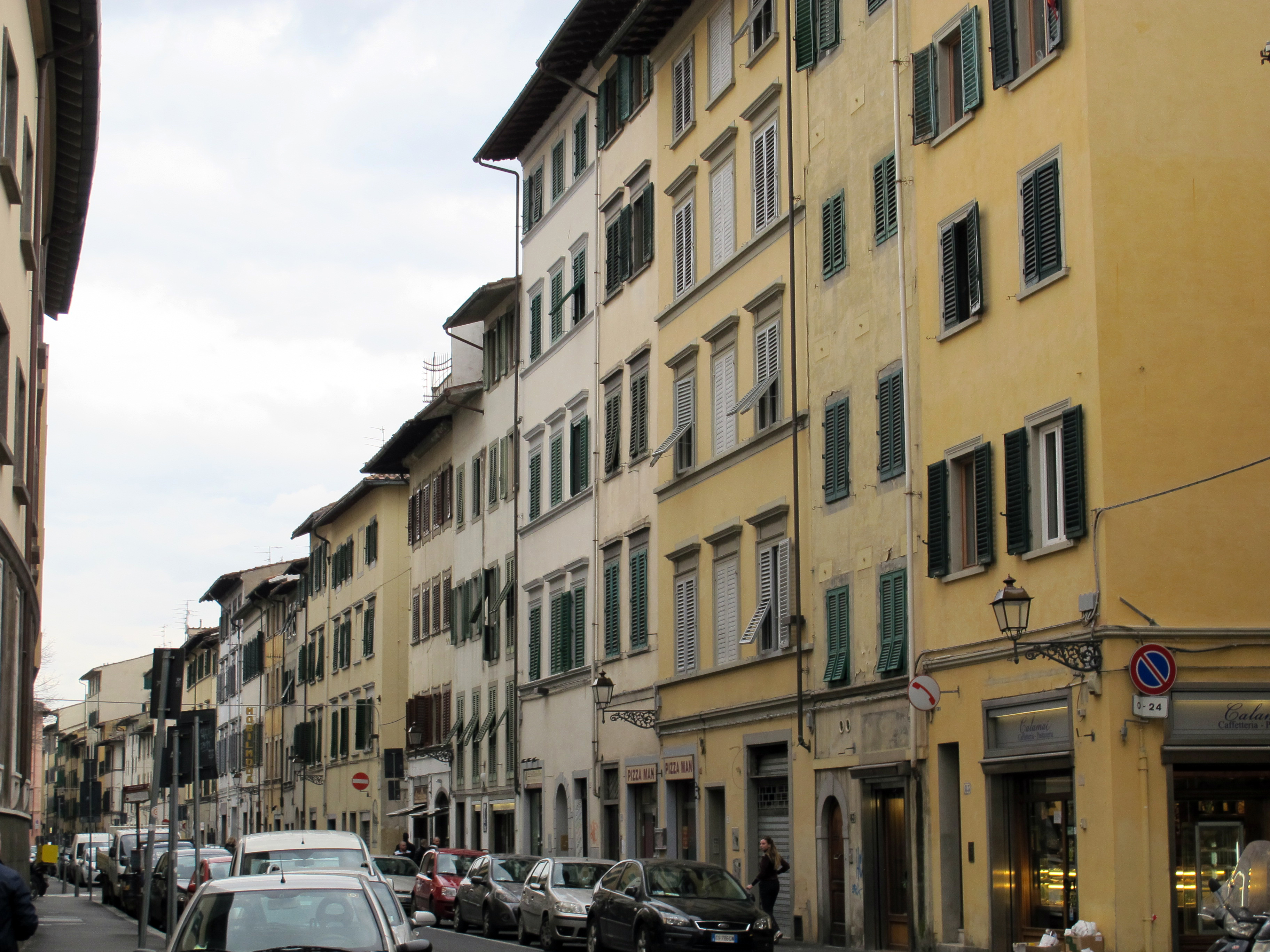 Via dell'agnolo, veduta